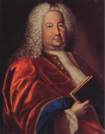 Ritratto di Jean-Baptiste De Tillier (1678-1744). Dipinto conservato presso il Municipio di Aosta.